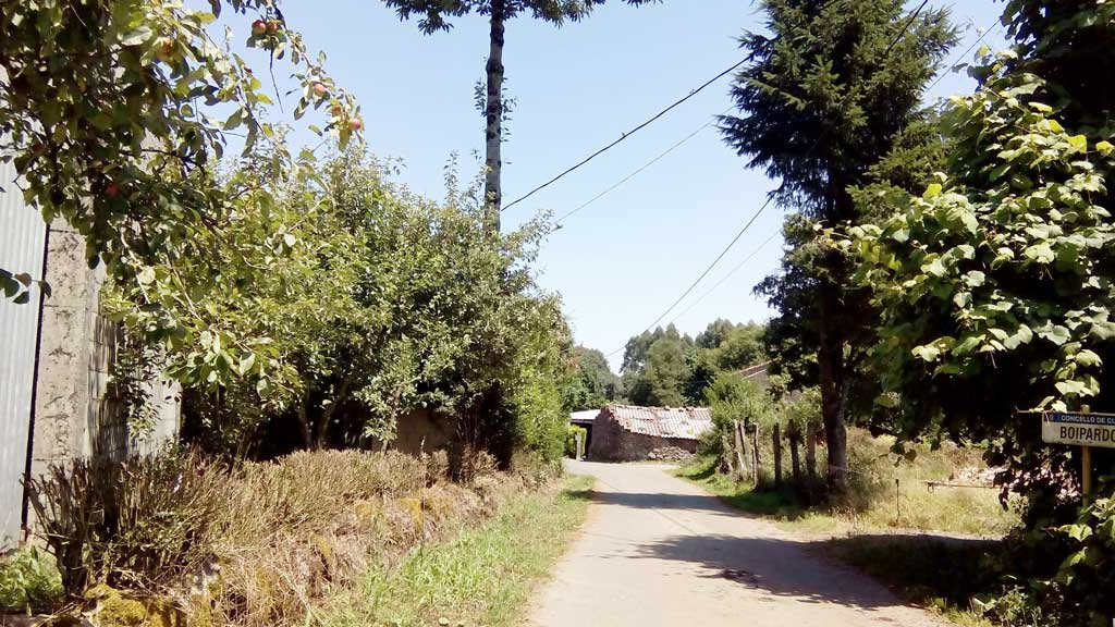 Vista de Boipardo, Curtis.